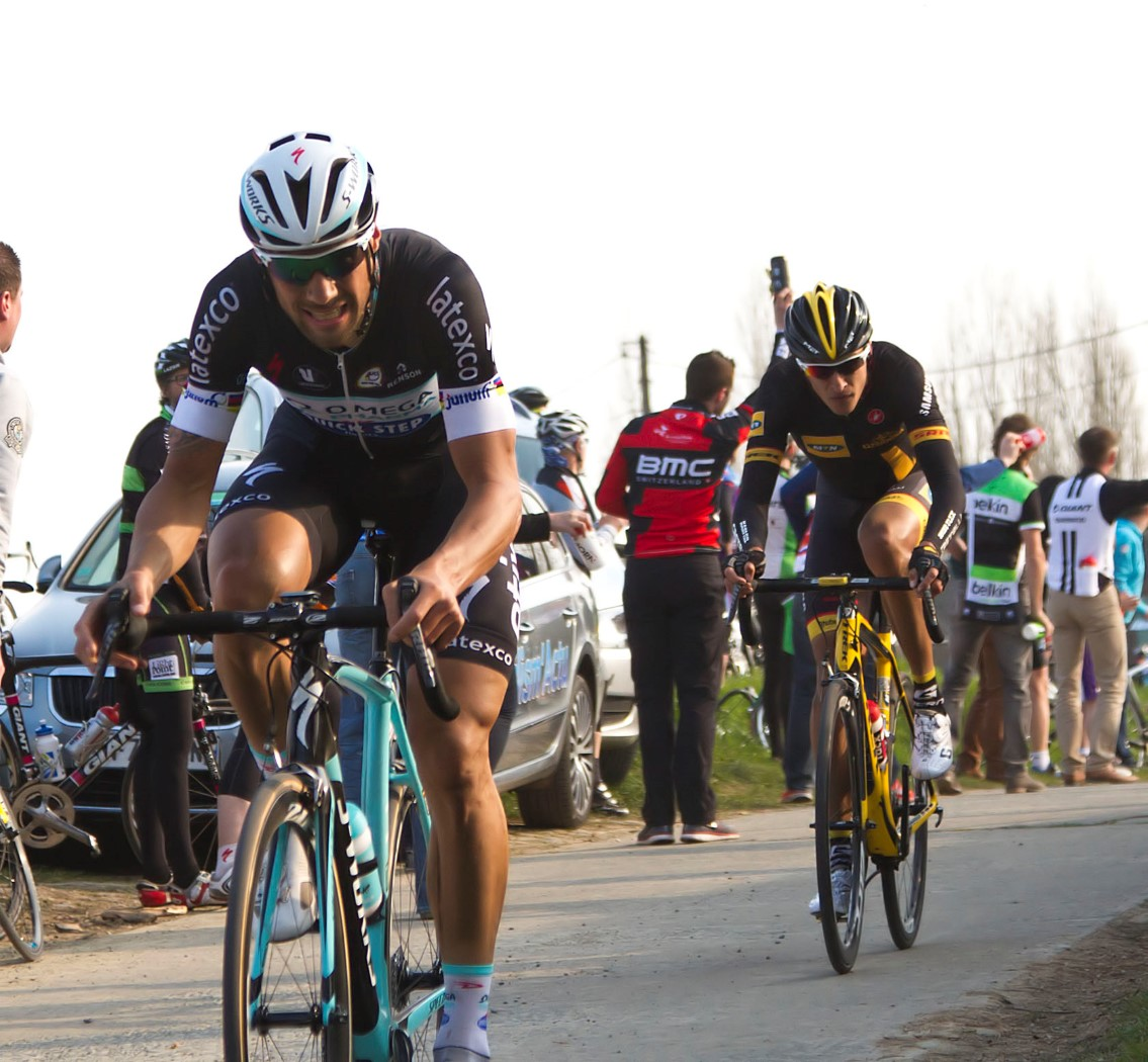 093 boonen